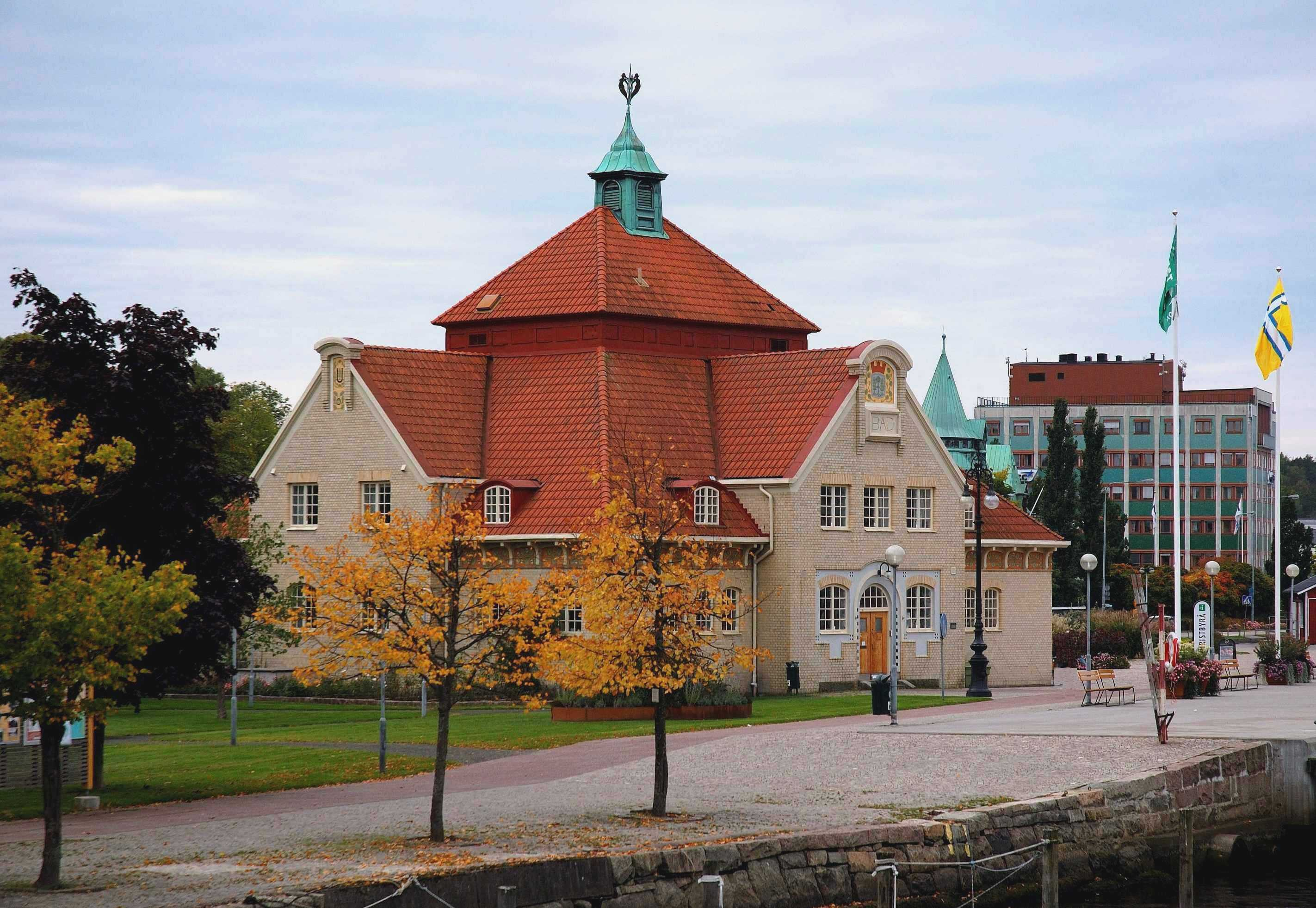 Uddevalla badhus. Byggnadsår 1907. Byggnadens exteriör och utformning i simhallen är utförd efter ritningar av Gustaf Hugo Sandberg. Övrigt planerades av stadsingenjören, sedermera stadens förste stadsarkitekt A Herder Lindeberg